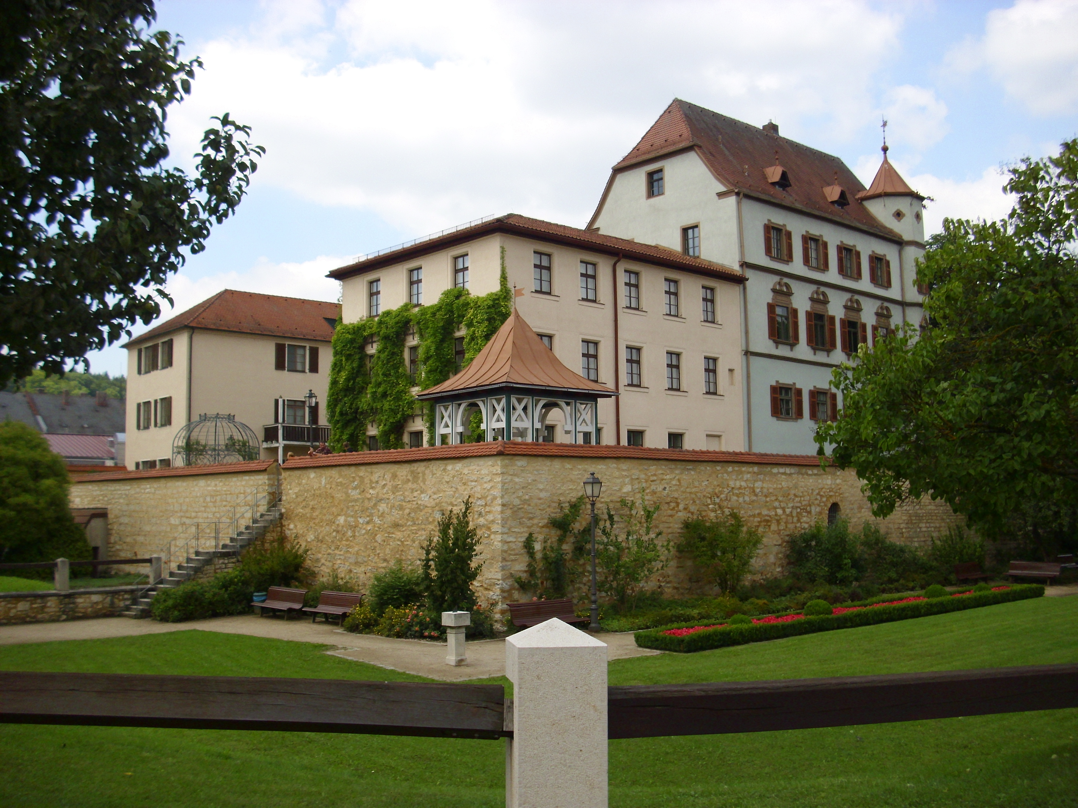 Stadtschloss Treuchtlingen von Südwesten